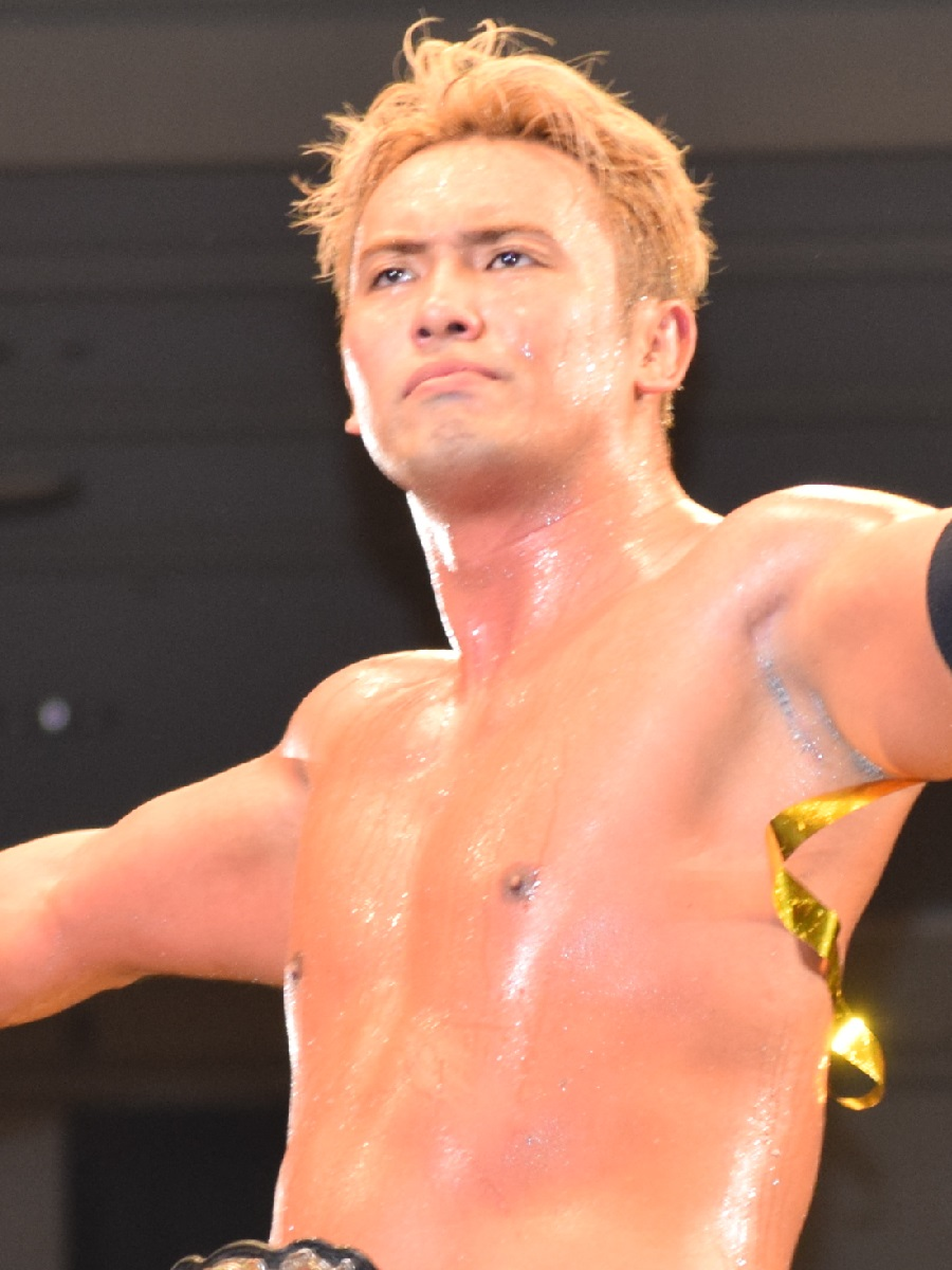 2016年2月11日 大阪府立体育会館 「THE NEW BEGINNING in OSAKA」 オカダ・カズチカ